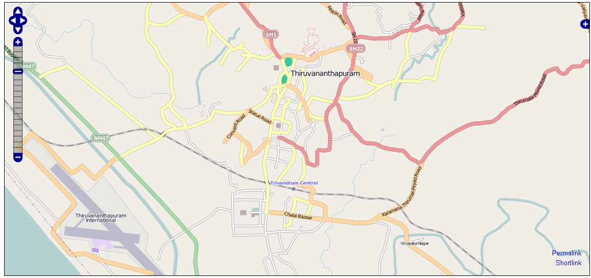 ഓപ്പൺസ്ട്രീറ്റ്മാപ്പ് ഒരു ദൃശ്യം This map may be incomplete, and may contain errors. Don't rely solely on it for navigation.